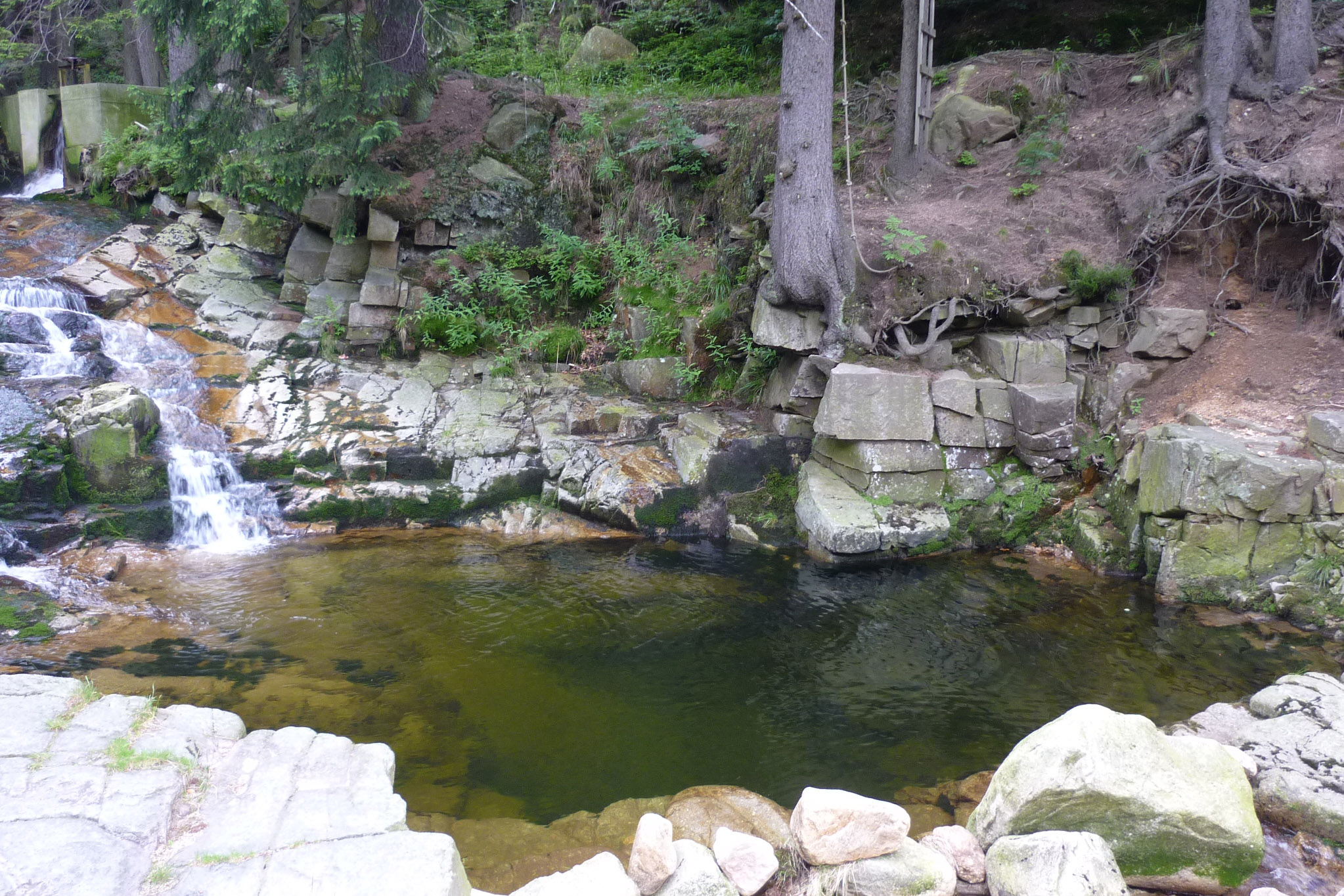 Große Lomnitz (Łomnica), Nebenfluss des Bober (Bóbr). Strudelloch bzw. Strudeltopf/Gumpe (marmitti), 200 m unterhalb des Wilden Wasserfalls (Dziki Wodospad) an der Kleinen Koppe (Kopa) bei Krummhübel (Karpacz) im Riesengebirge, Niederschlesien, Polen.